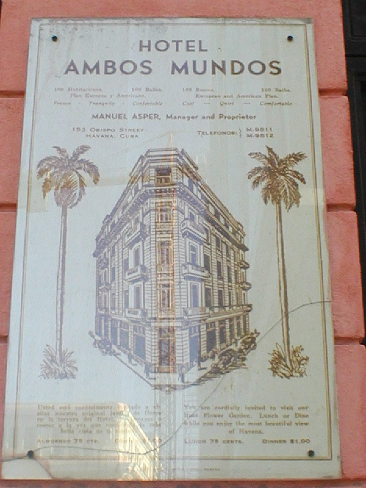 Hotel Ambos Mundos - En la década de 1930 fue la residencia de Ernest Hemingway en La Habana, Cuba. Autor: Beatriz Busaniche aka MotherForker Fecha: Febrero de 2006